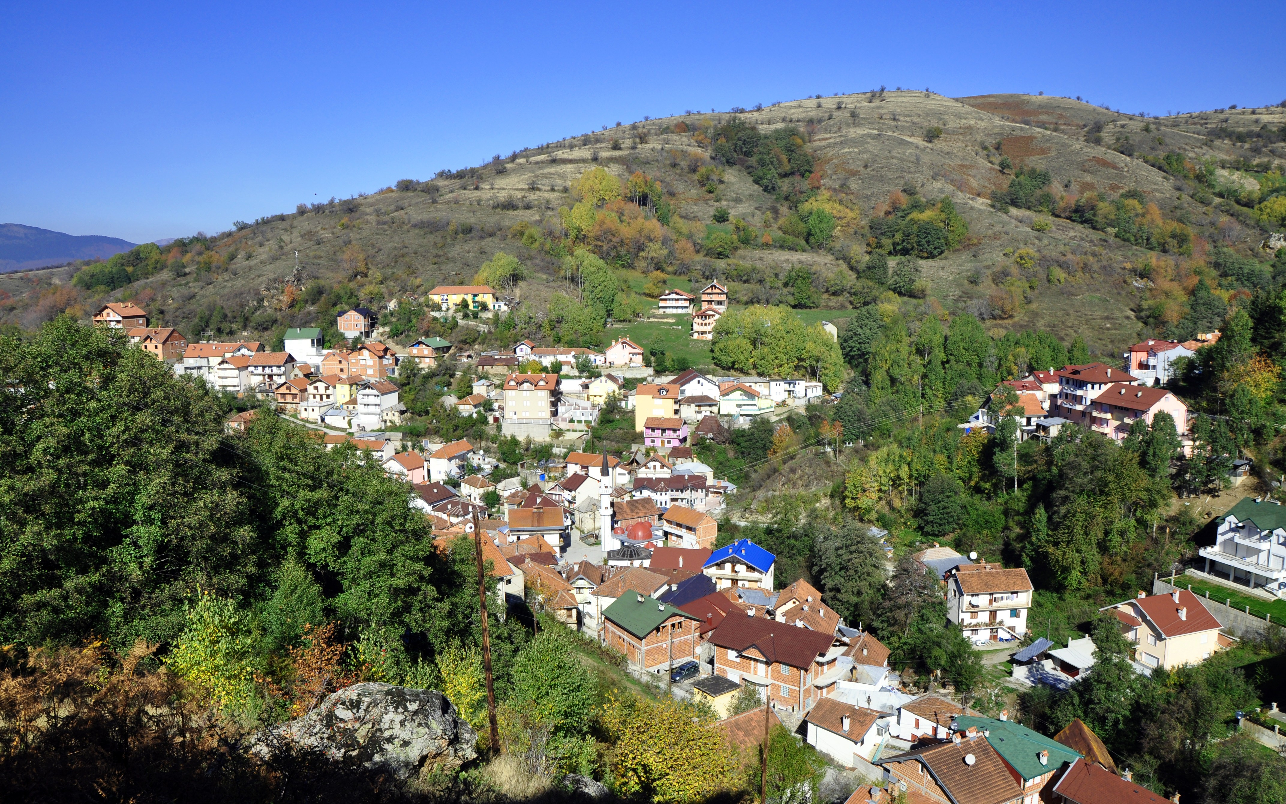 selo Donja Radeša, Dragaš